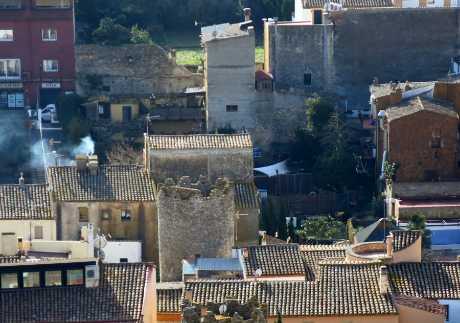 Torre Can Marquès de Begur - Baix Empordà - Catalunya